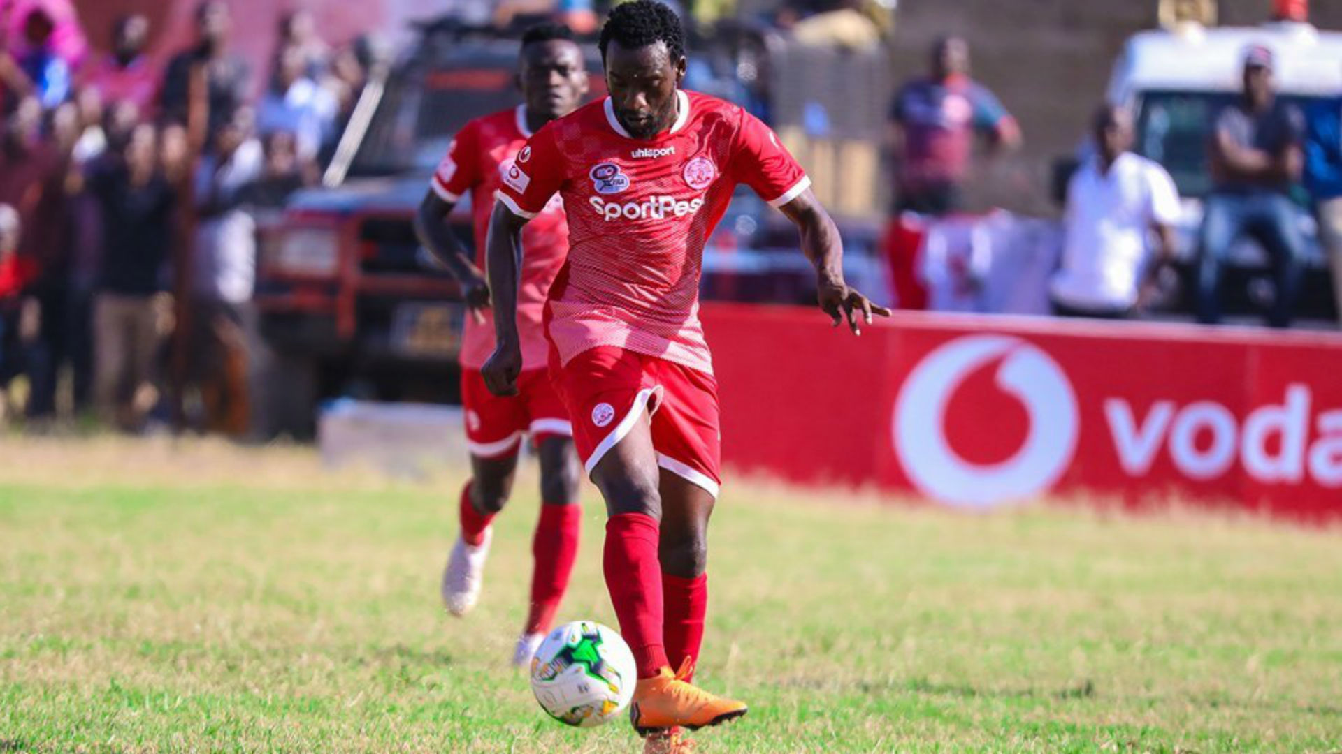 Kiswahili: Ajibu akiwa kaika mechi ya Simba Sports Club